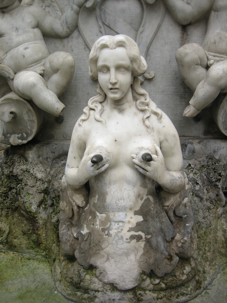 Amalfi, Campania, Italia